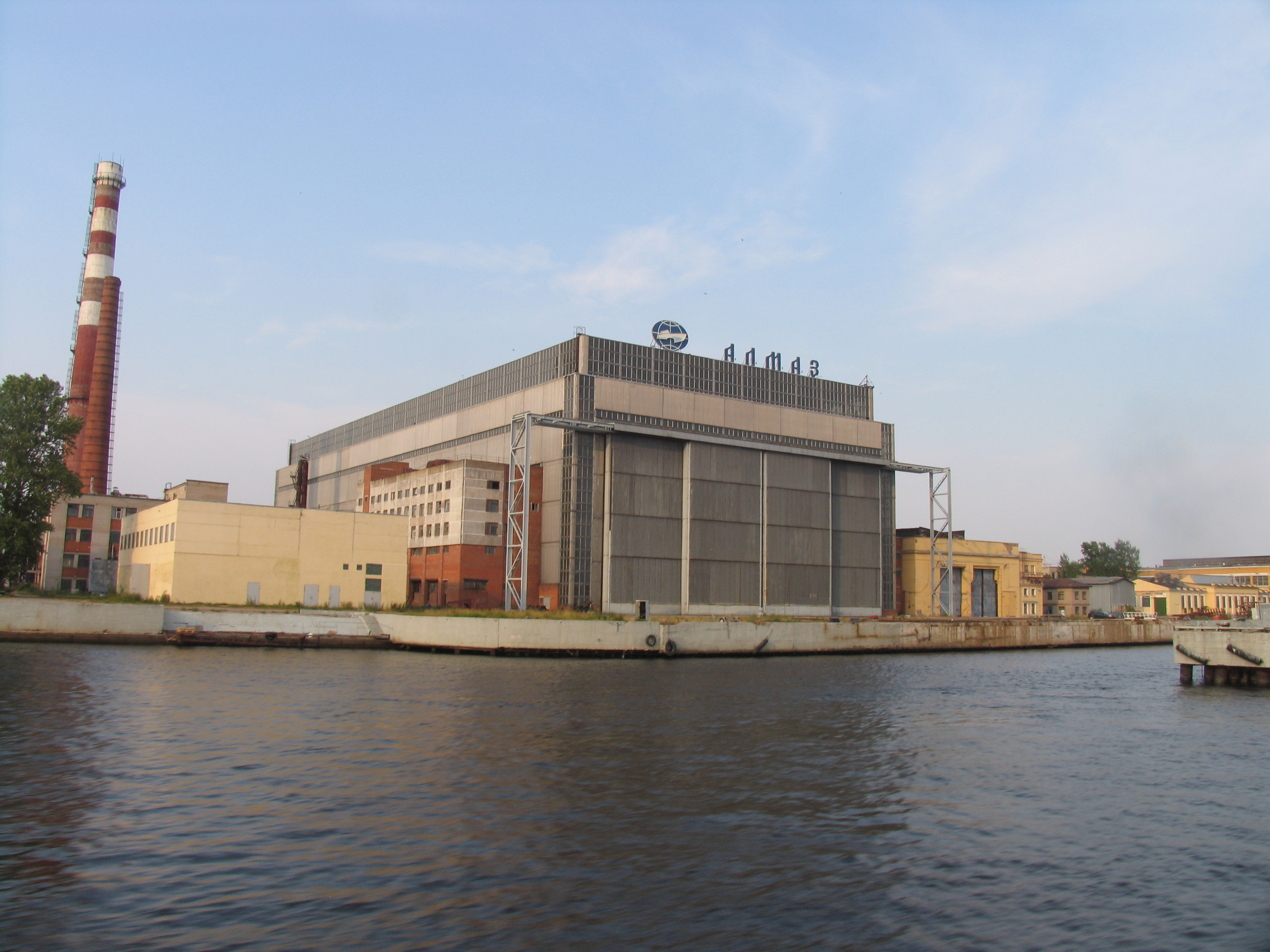 Вид на судостроительный завод "Алмаз" с Малой Невы.